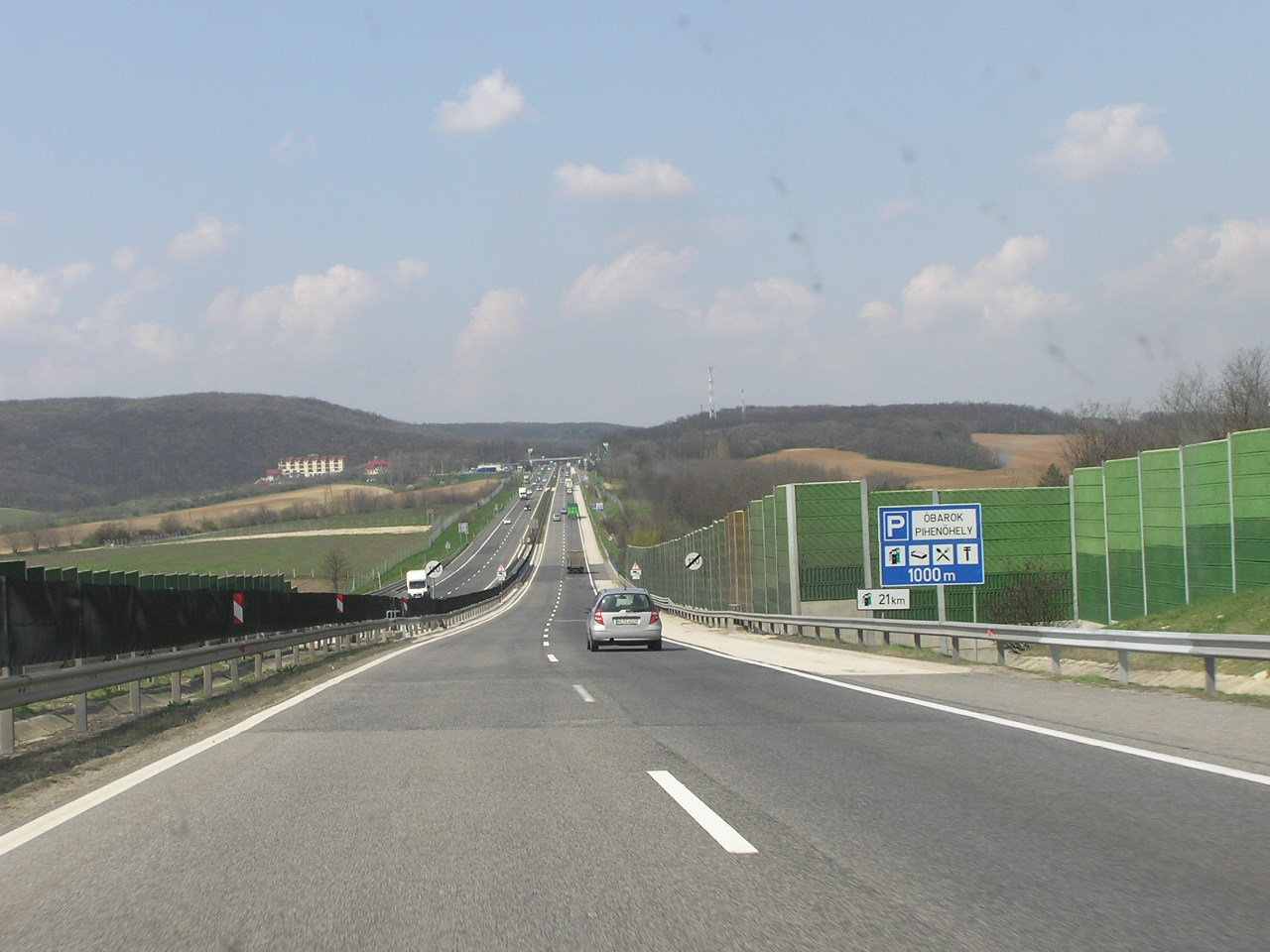 Die Autobahn M1 nach Budapest in Richtung Wien.